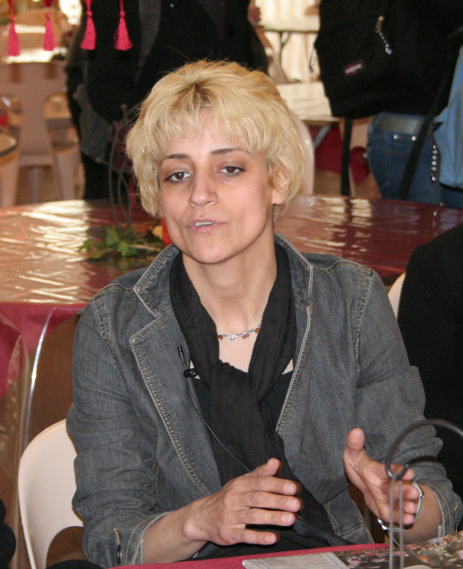 Marzieh Meshkini au Festival International des cinémas d'Asie